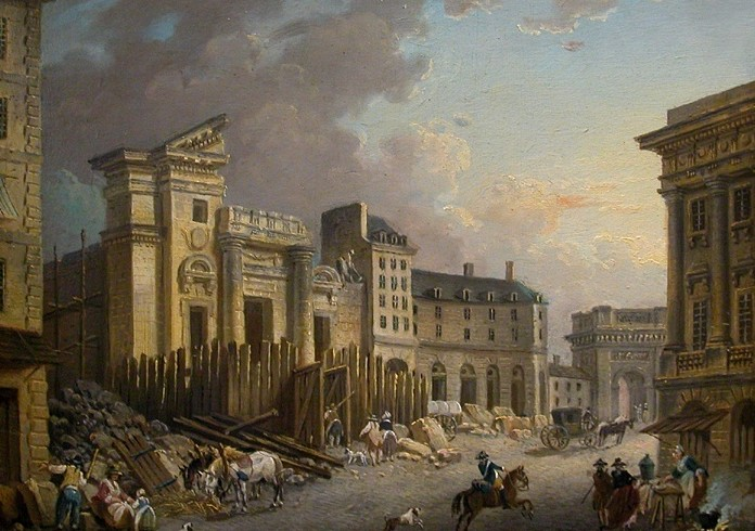 emplacement de l'actuel Tribunal de Commerce